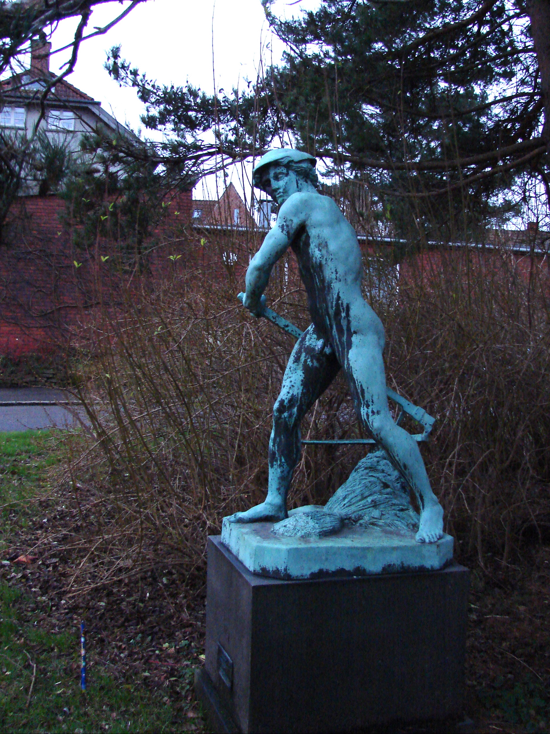 Høstmand af Jean-Baptiste Claude Eugène Guillaume (1822-1905), ved Stubbevangen, København